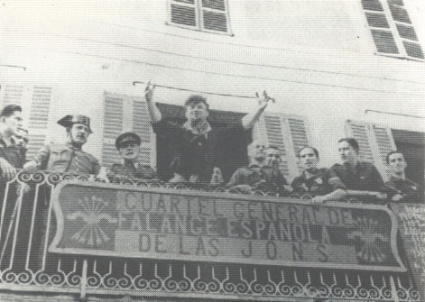 Arconovaldo Bonaccorsi a Manacor.